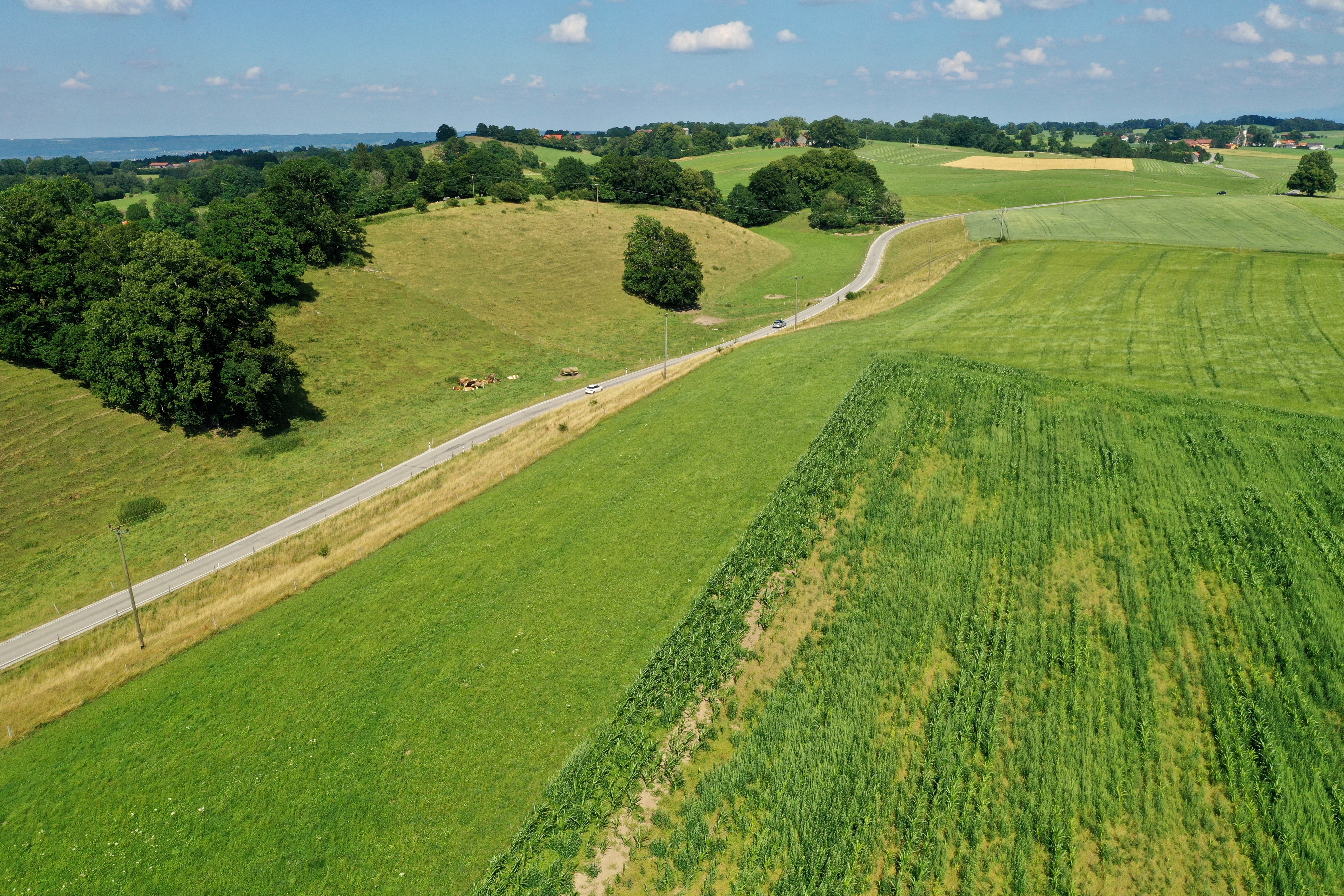 Die Moränenwälle von Oberforst